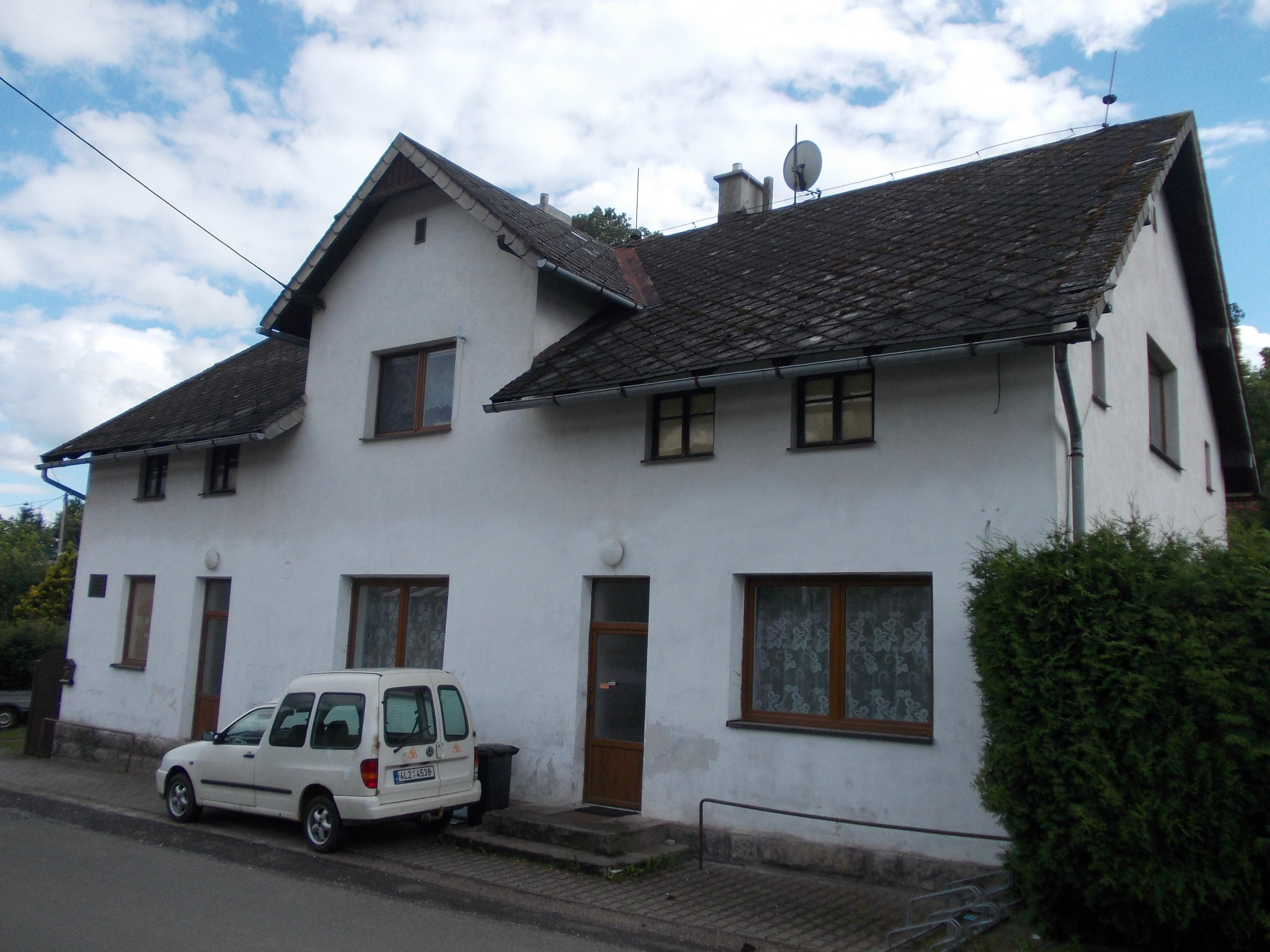 Zálesní Lhota - rodný dům Jiřího Šlitra (č.p. 52)